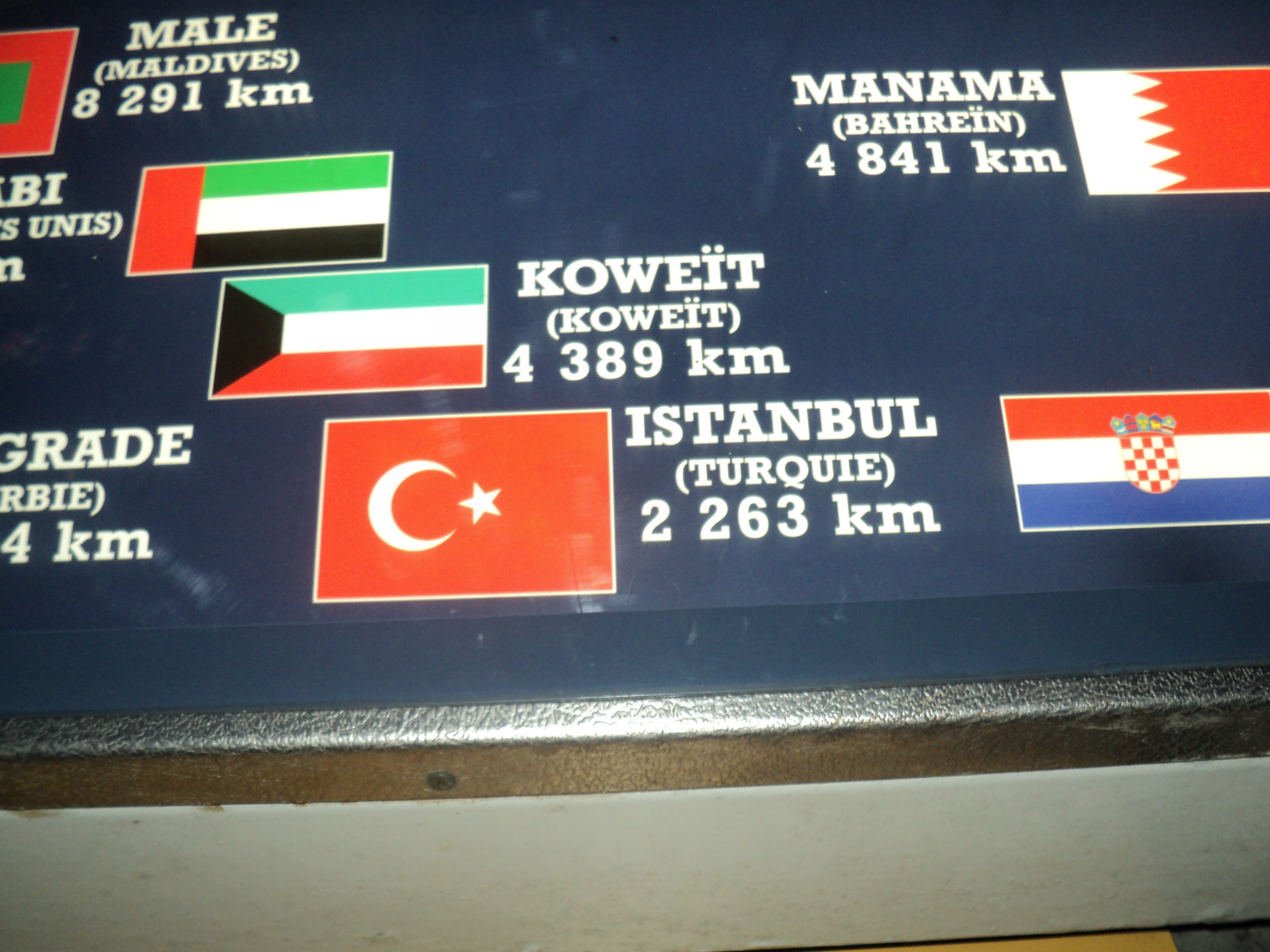 eyfel kulesinin tepesindeki dünyadaki şehirlerin yönünü ve oraya uzaklığını gösteren tabelada istanbul'un bulunduğu kısım